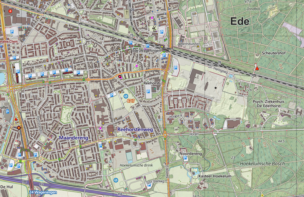 Topografische kaart van Ede (woonplaats). Resolutie: 300 pixels/km. Kaartbeeld samengesteld uit de open geodata van de Top10NL en Top25namen (Basisregistratie Topografie, Kadaster), Creative Commons BY licentie. Gebouwvlakken uit open geodata BAG extract. Wegen uit de OpenStreetMap, OpenStreetMap community. Reliëfschaduw uit de Actuele Hoogtekaart AHN2. Samenstelling en kleurenschema: Jan-Willem van Aalst, met QGIS2. Zie ook de Legenda.